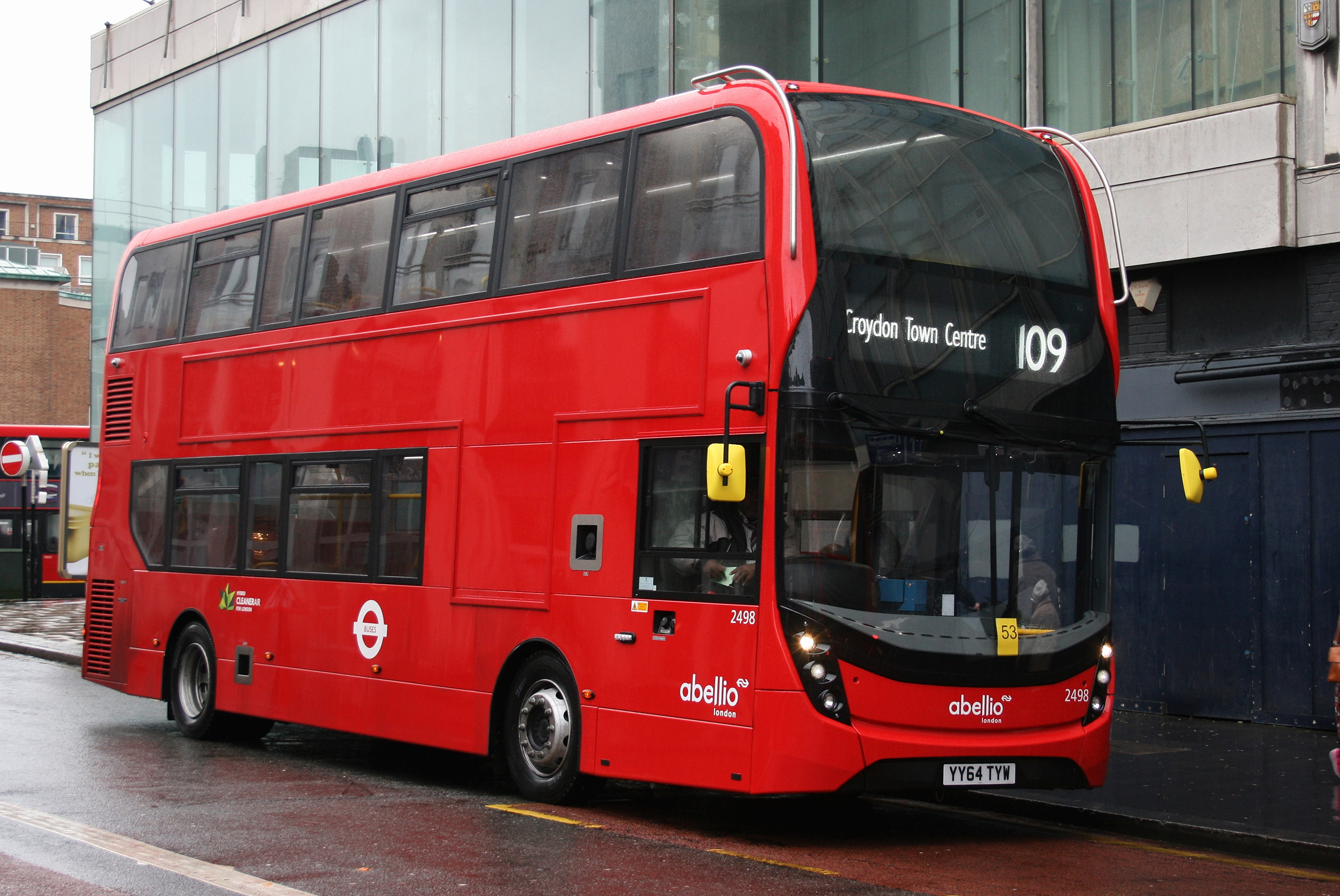 YY64 TYW